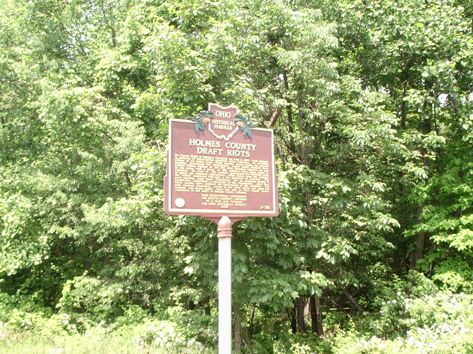 Fort Fizzle Marker